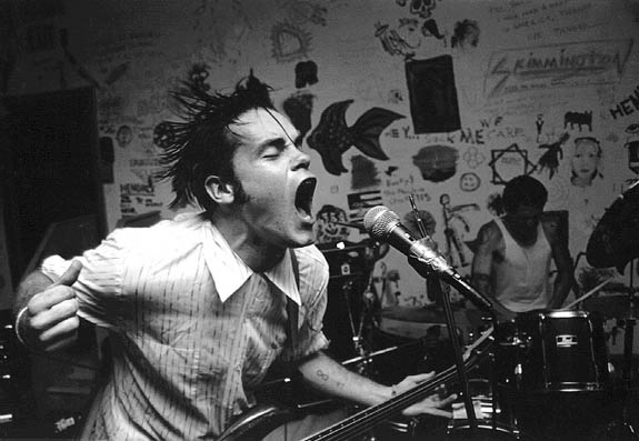 Still Life, banda emocore de los años 90